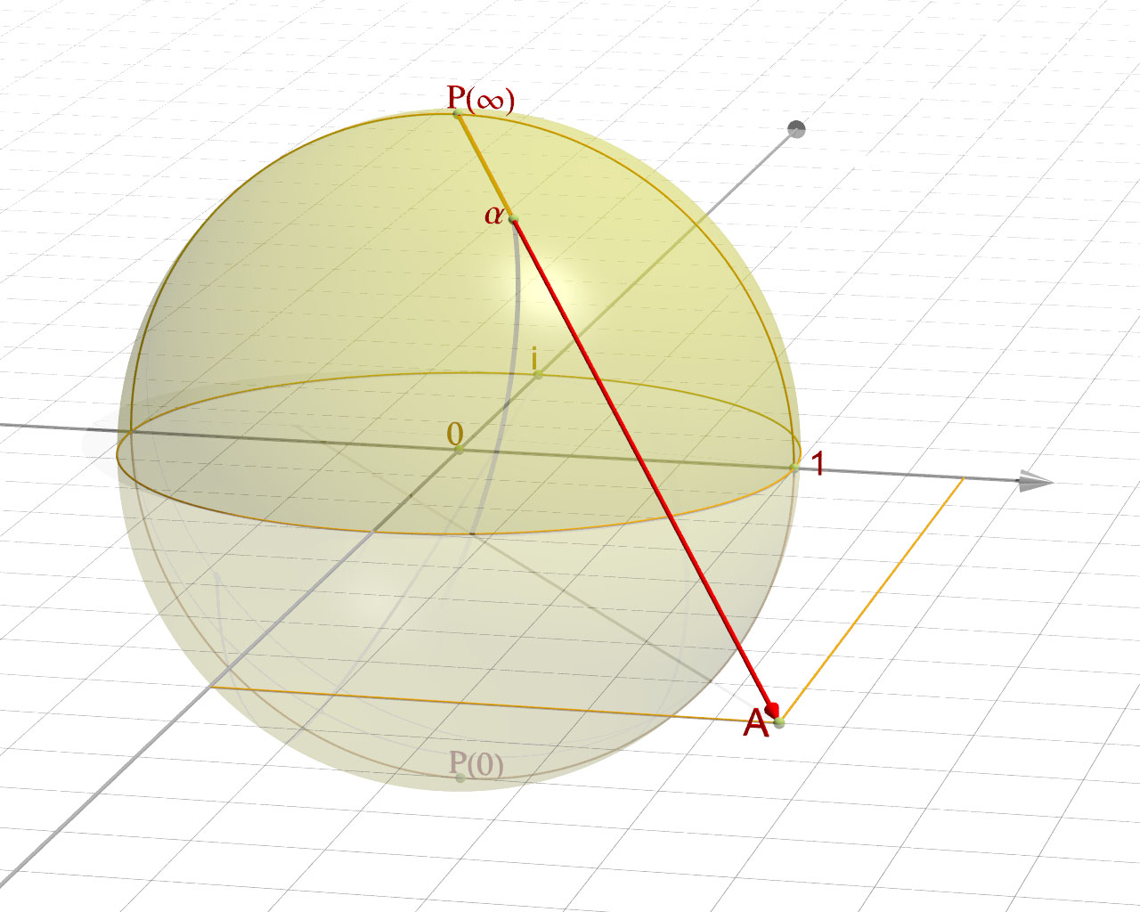 Sphère de Riemann, démonstration de la projection